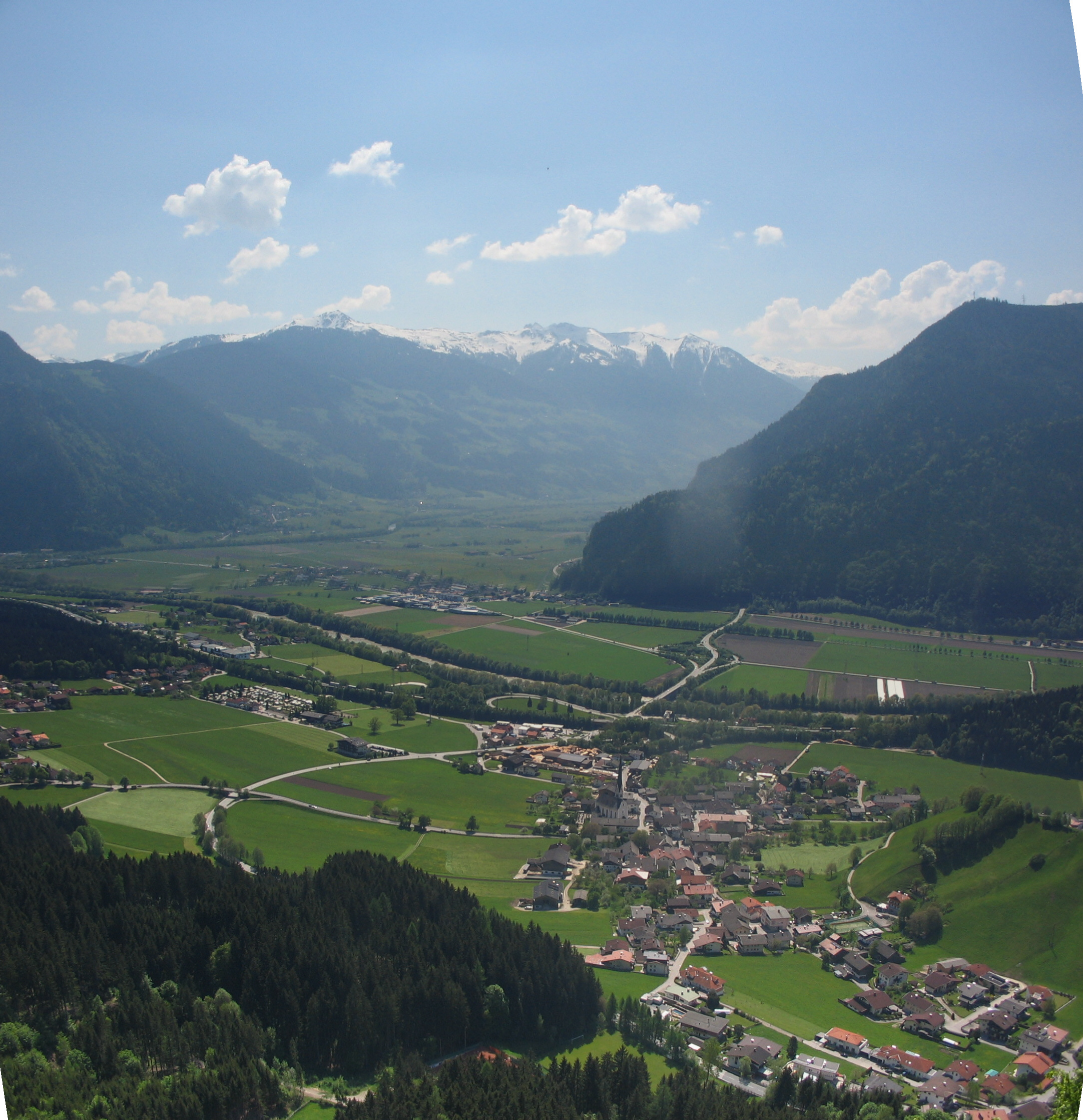 zillerthal mai 2008